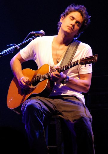 John Mayer ao vivo